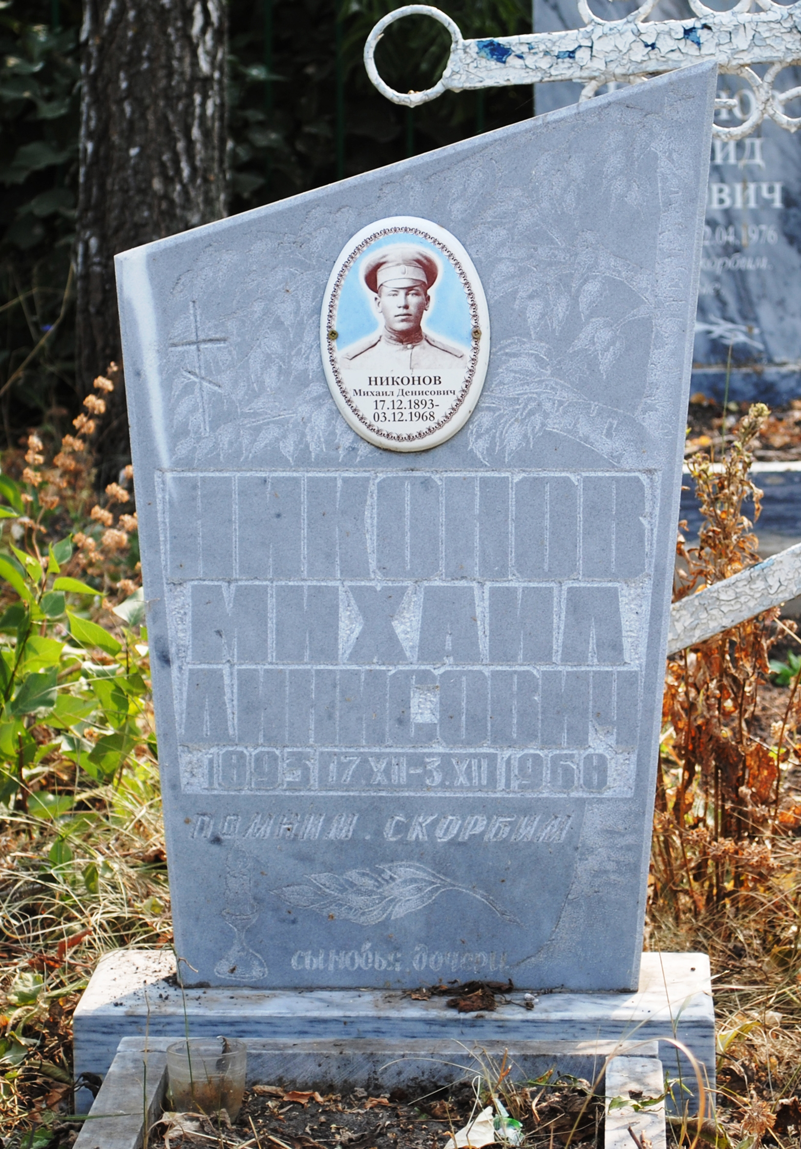 Захоронение